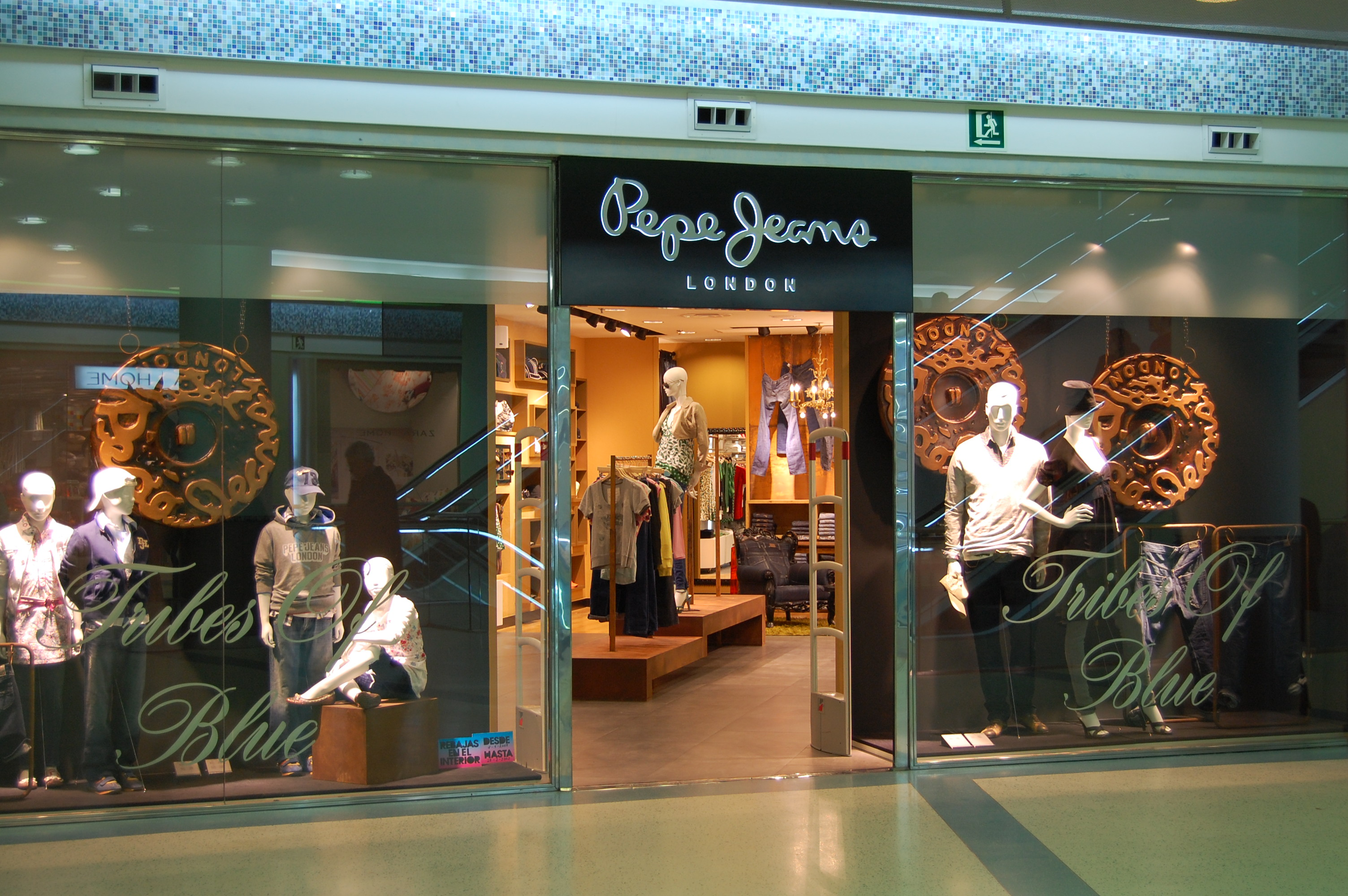 Loja da Pepe Jeans no Centro Comercial Gran Vía de Vigo.